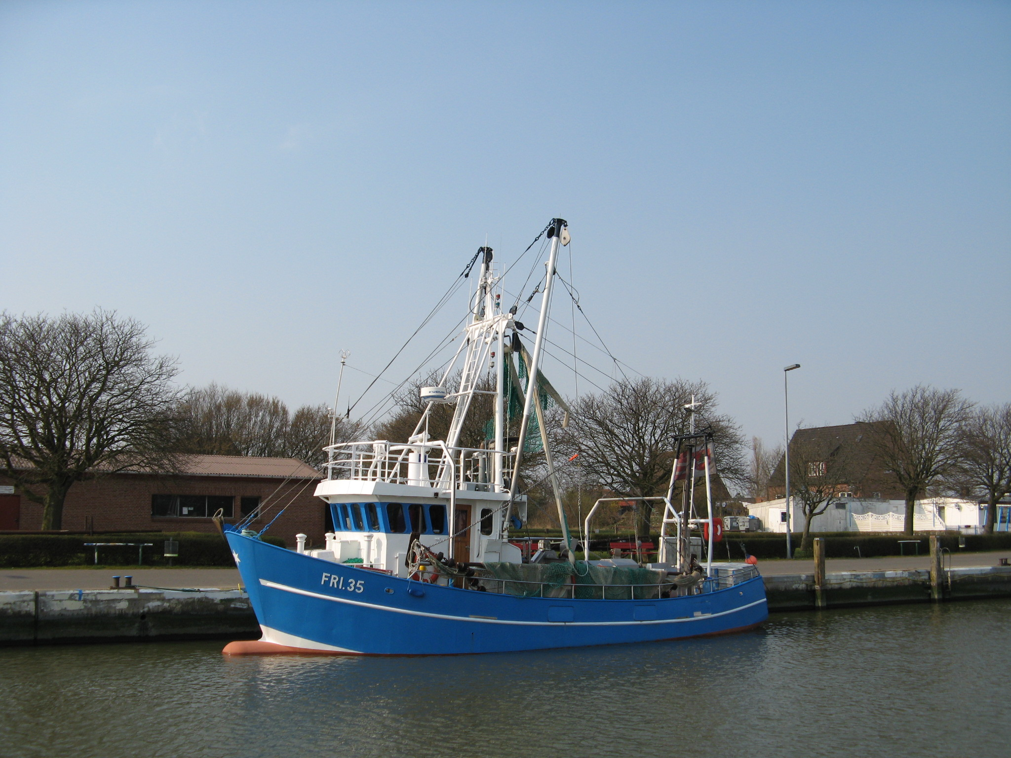 Fischkutter Friedrichskoog, Hafen FRI 35 - ZENITH Trawler, Friedrichskoog Harbour